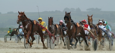 Courses hippiques de la Baie de Kernic de Plouescat.